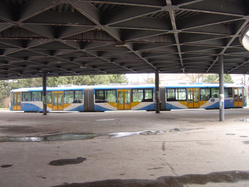 DPMO Ostrava